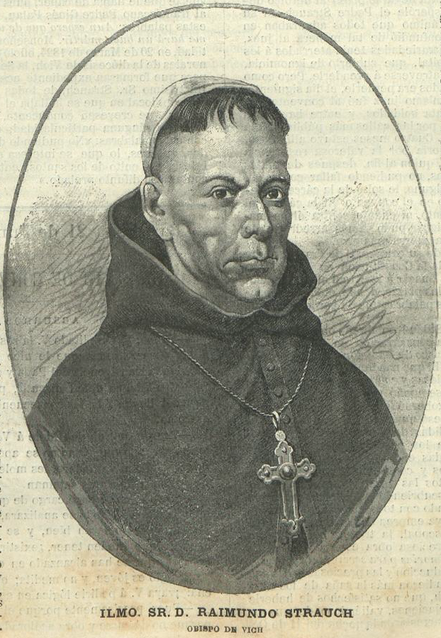 Raimundo (Ramón) Strauch, obispo de Vich. La Hormiga de Oro, Barcelona. año I, n.º XXV, junio de 1884. Biblioteca Nacional de España